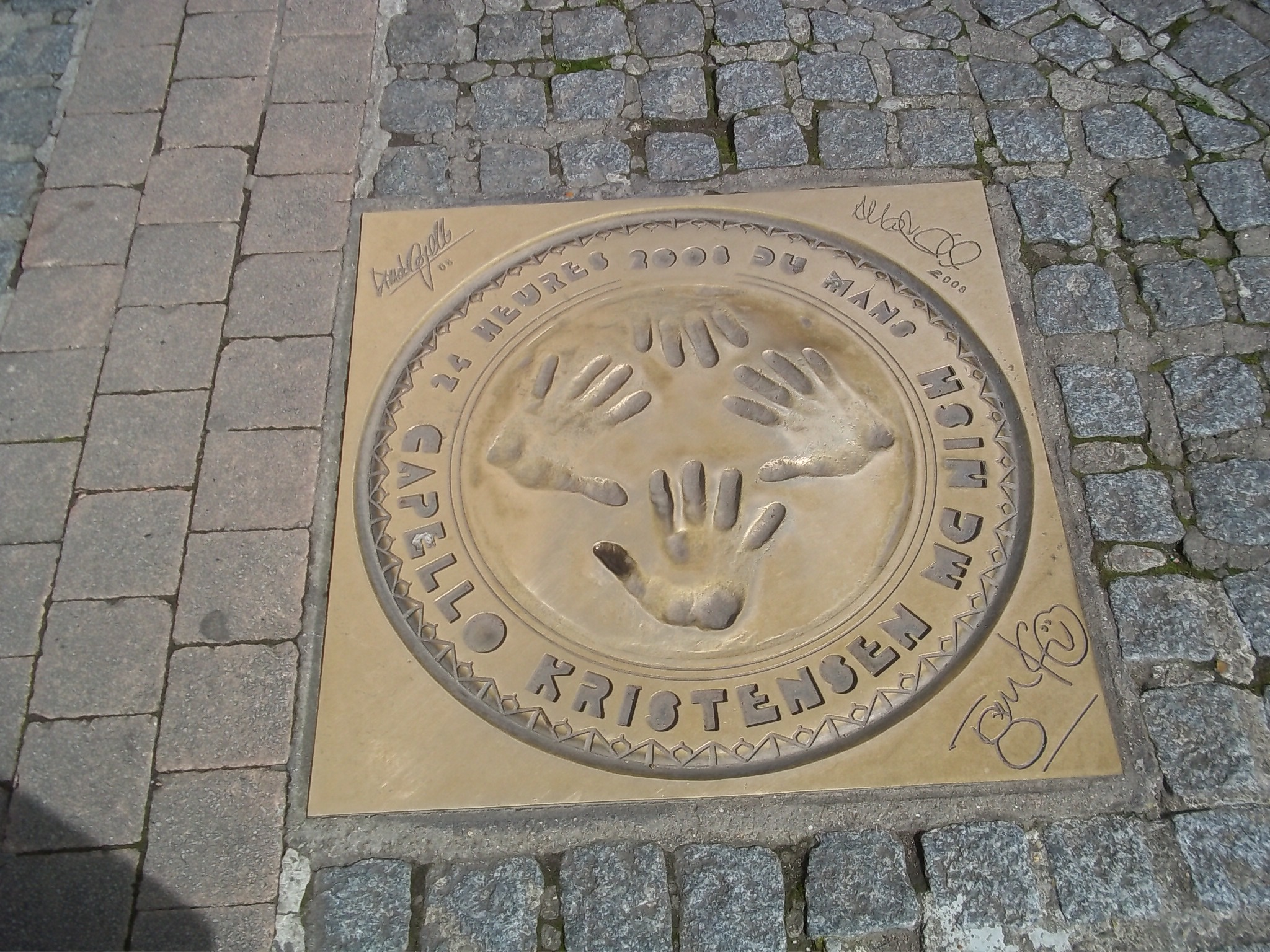 Plaque de bronze des empreintes des vainqueurs des 24 heures 2008